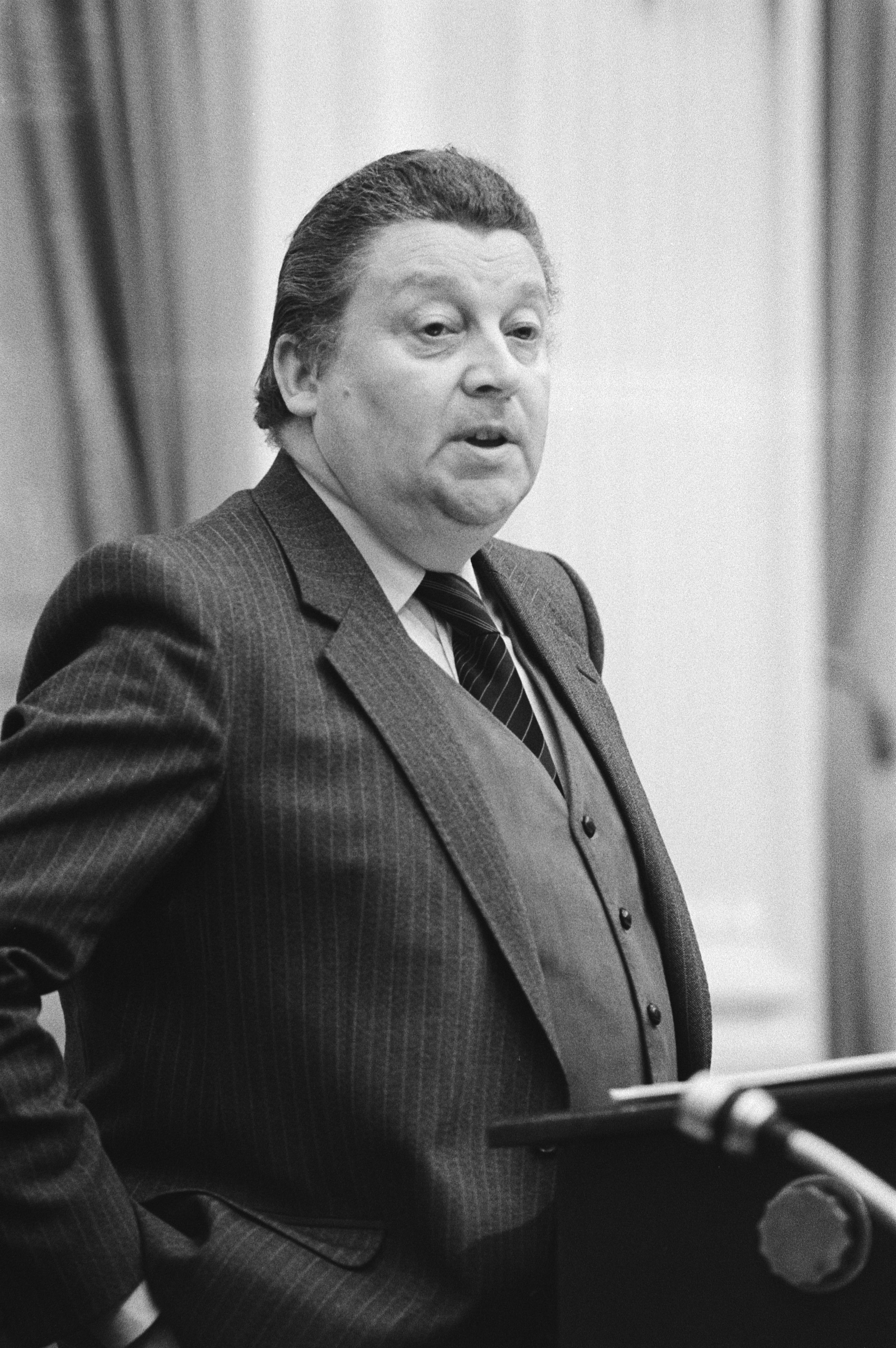 Collectie / Archief : Fotocollectie Anefo Reportage / Serie : [ onbekend ] Beschrijving : Staatssecretaris Ad Hermes aan het woord tijdens de debatten over de wet op de onderwijshervorming Datum : 29 januari 1981 Locatie : Binnenhof, Den Haag, Zuid-Holland Trefwoorden : microfoons, parlementaire debatten, parlementariërs, staatssecretarissen, wetsontwerpen Persoonsnaam : Hermes, A.J. Fotograaf : Dijk, Hans van / Anefo, [onbekend] Auteursrechthebbende : Nationaal Archief Materiaalsoort : Negatief (zwart/wit) Nummer archiefinventaris : bekijk toegang 2.24.01.05 Bestanddeelnummer : 931-2926